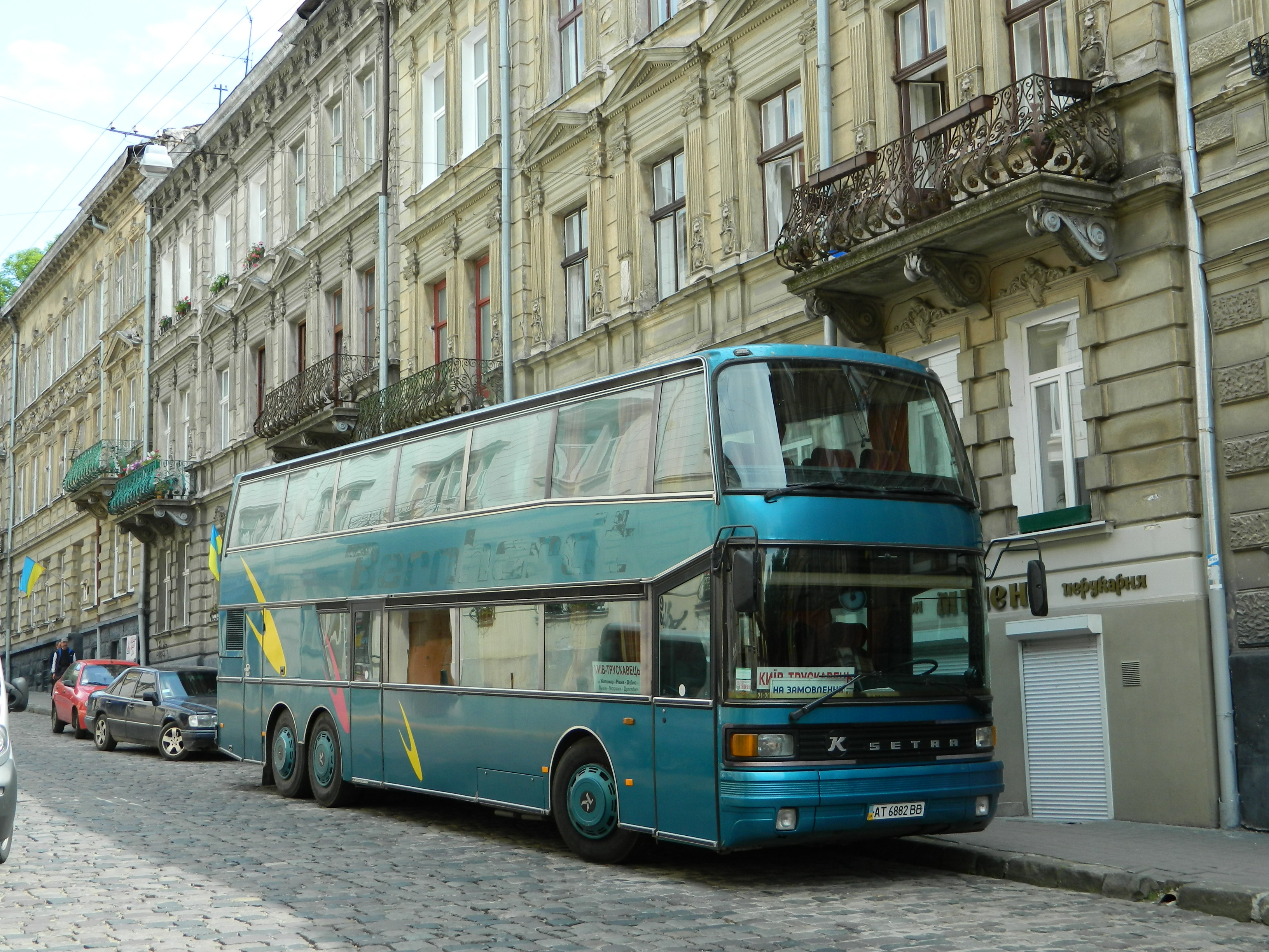 Setra S215 Doubledecker bus. Works on root Kyiv-Truskavets